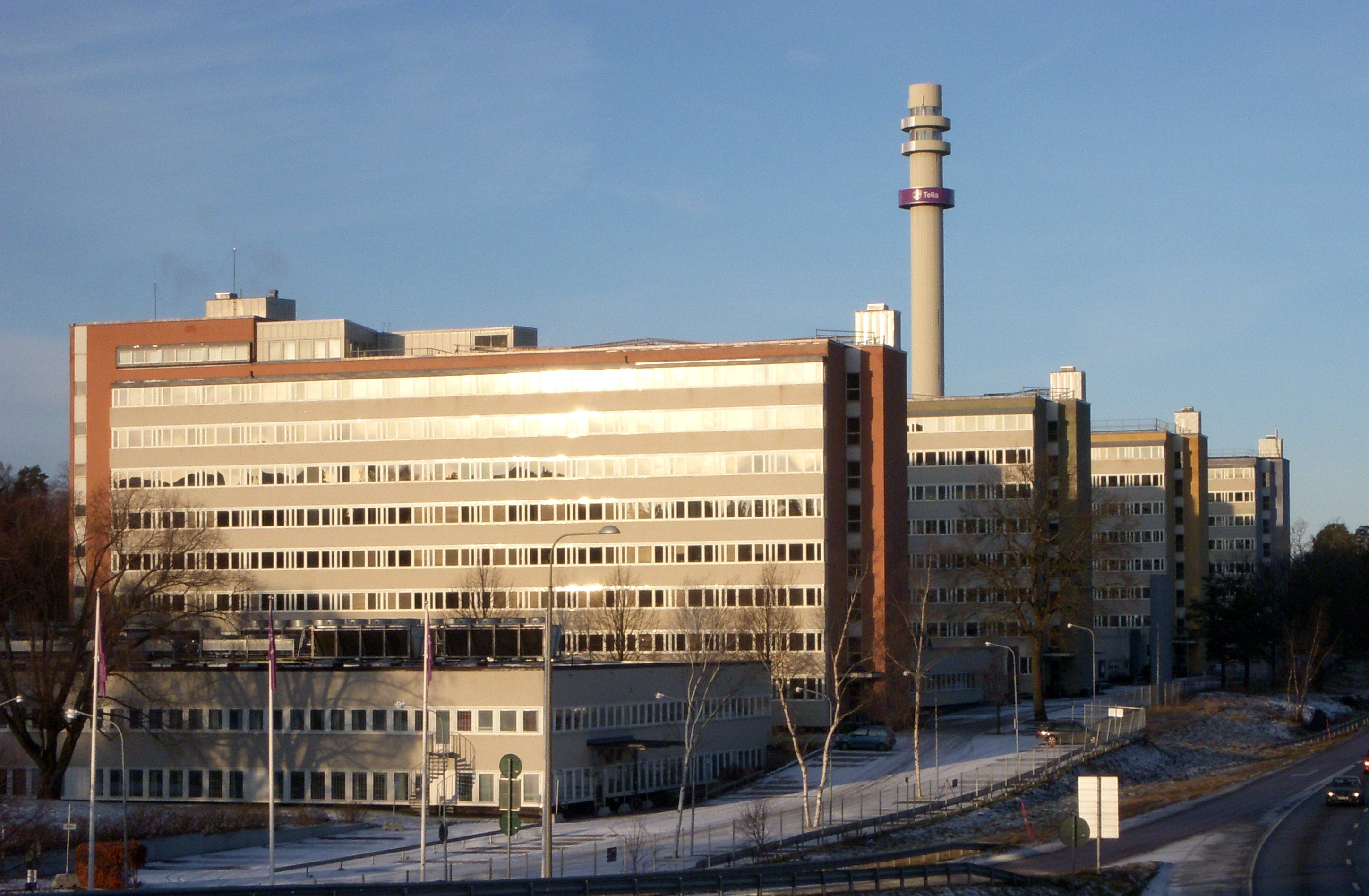 Telias huvudkontor i Farsta